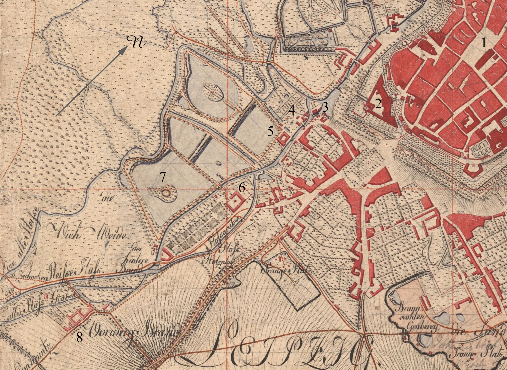 Leipzig nach Südwesten um 1800 (Ausschnitt aus Meilenblätter von Sachsen 1780-1806)1 = Markt, 2 = Pleißenburg, 3 = Nonnenmühle, 4 = Schwägrichens Garten (ab 1814), 5 = Trierscher Garten6 = Schimmels Gut (ab 1823), 7 = Buen Retiro, 8 = Brand-Vorwerk